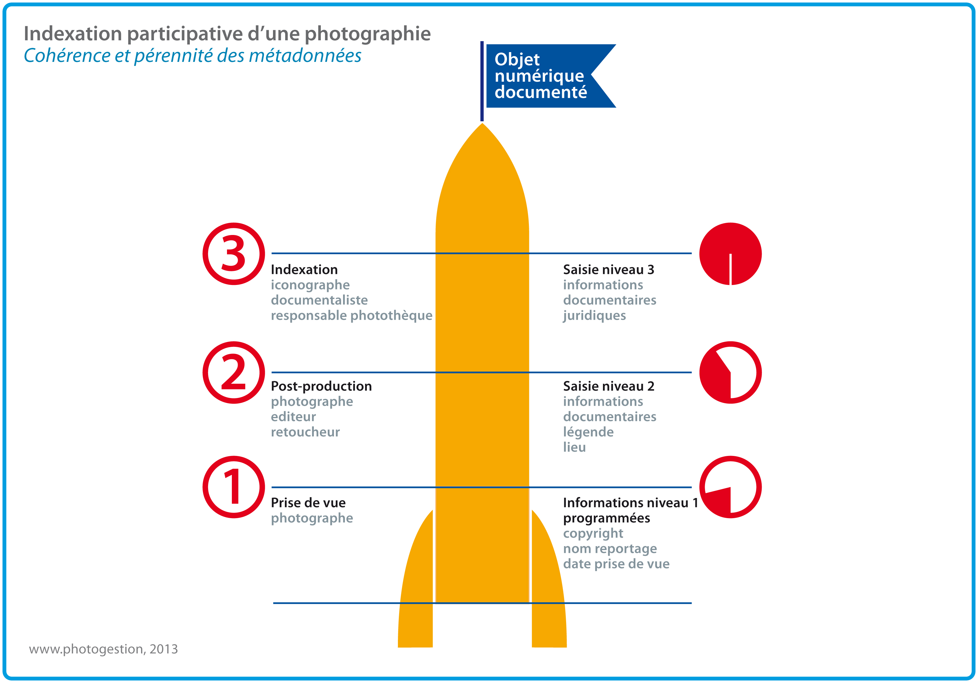 Indexation participative d'une photographie par les différents intervenants.